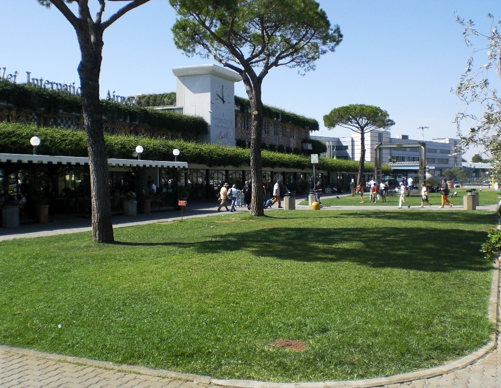 Esterno dell'aeroporto Galileo Galilei di Pisa. 22 Settembre 2009